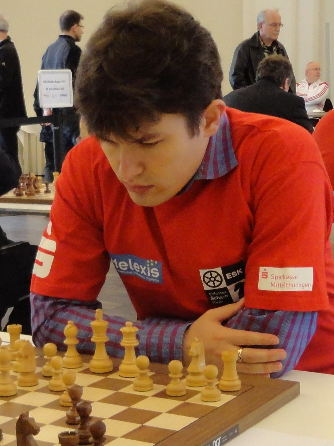 Evgeny Romanov, Deutsche Schachbundesliga Saison 2015/16, Runde 12 in Baden-Baden.